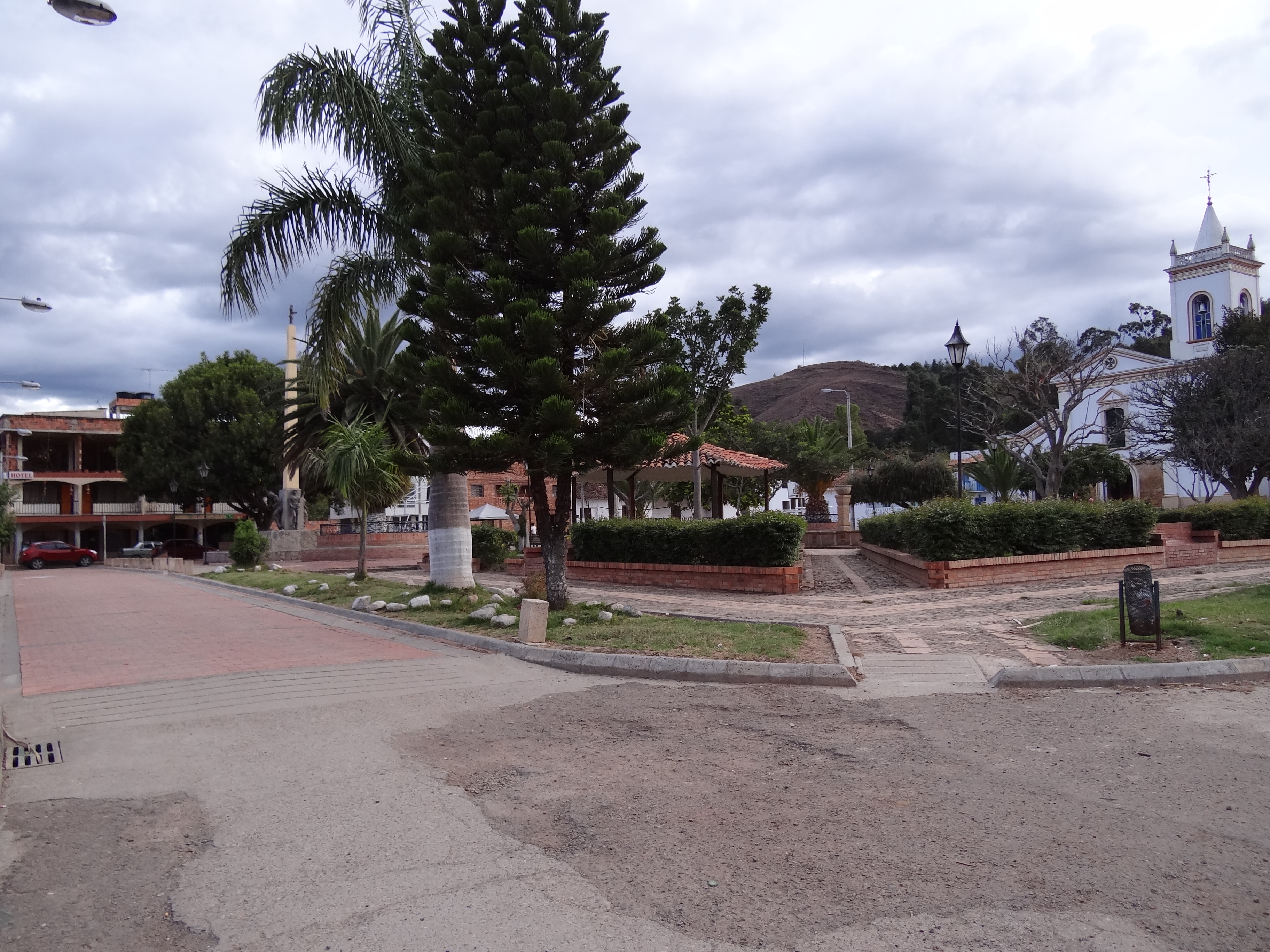 Parque principal del municipio de Tinjacá, departamento de Boyacá, Colombia